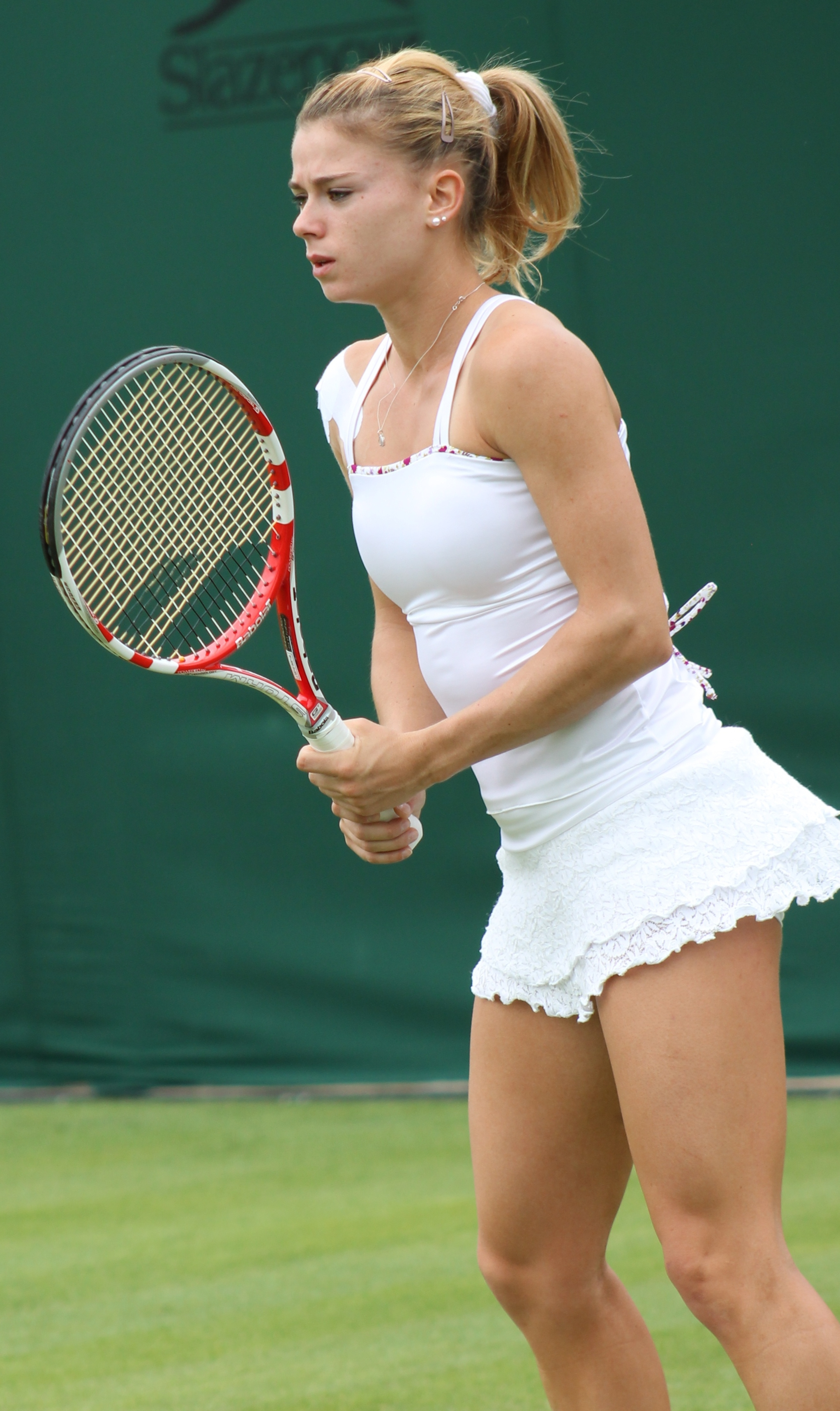 Camila Giorgi at 2013 Wimbledon